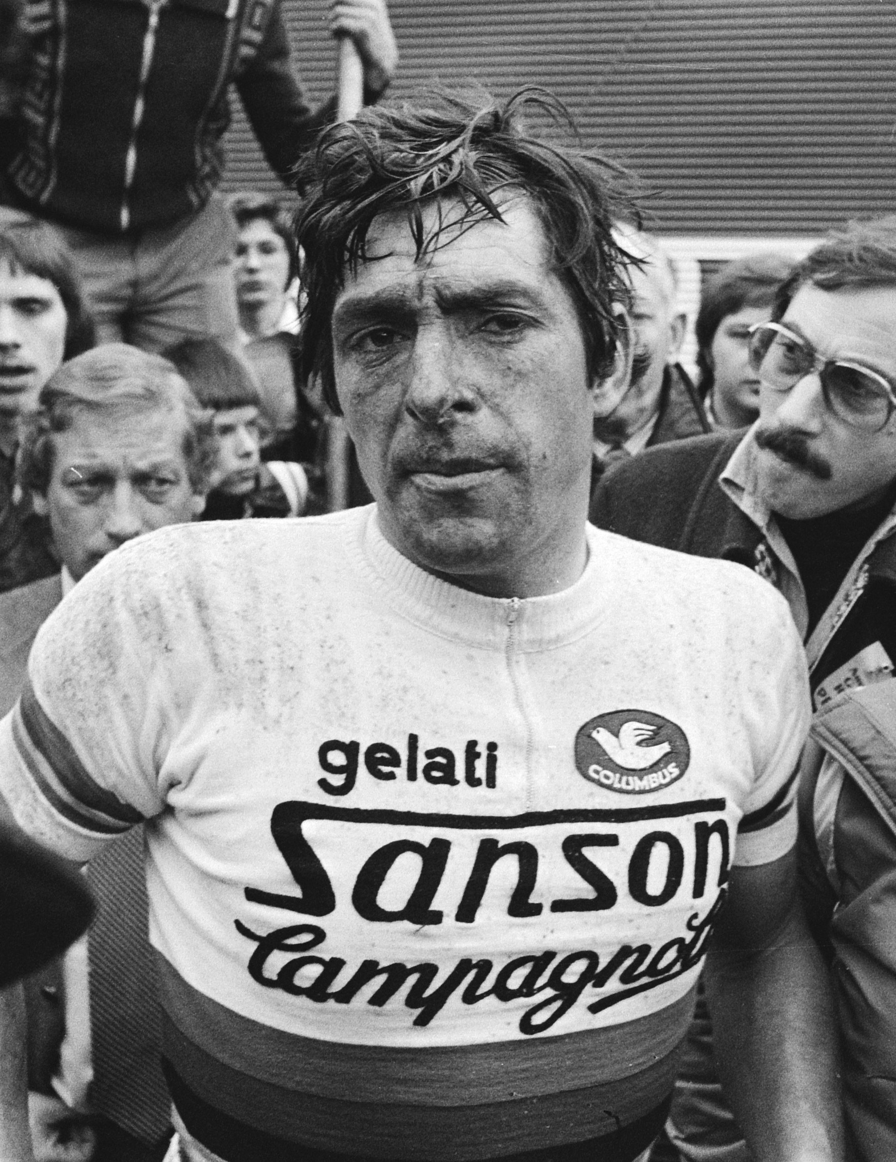 Amstel Gold Race wielrennen. Renner Francesco Moser (de wereldkampioen van 1977).